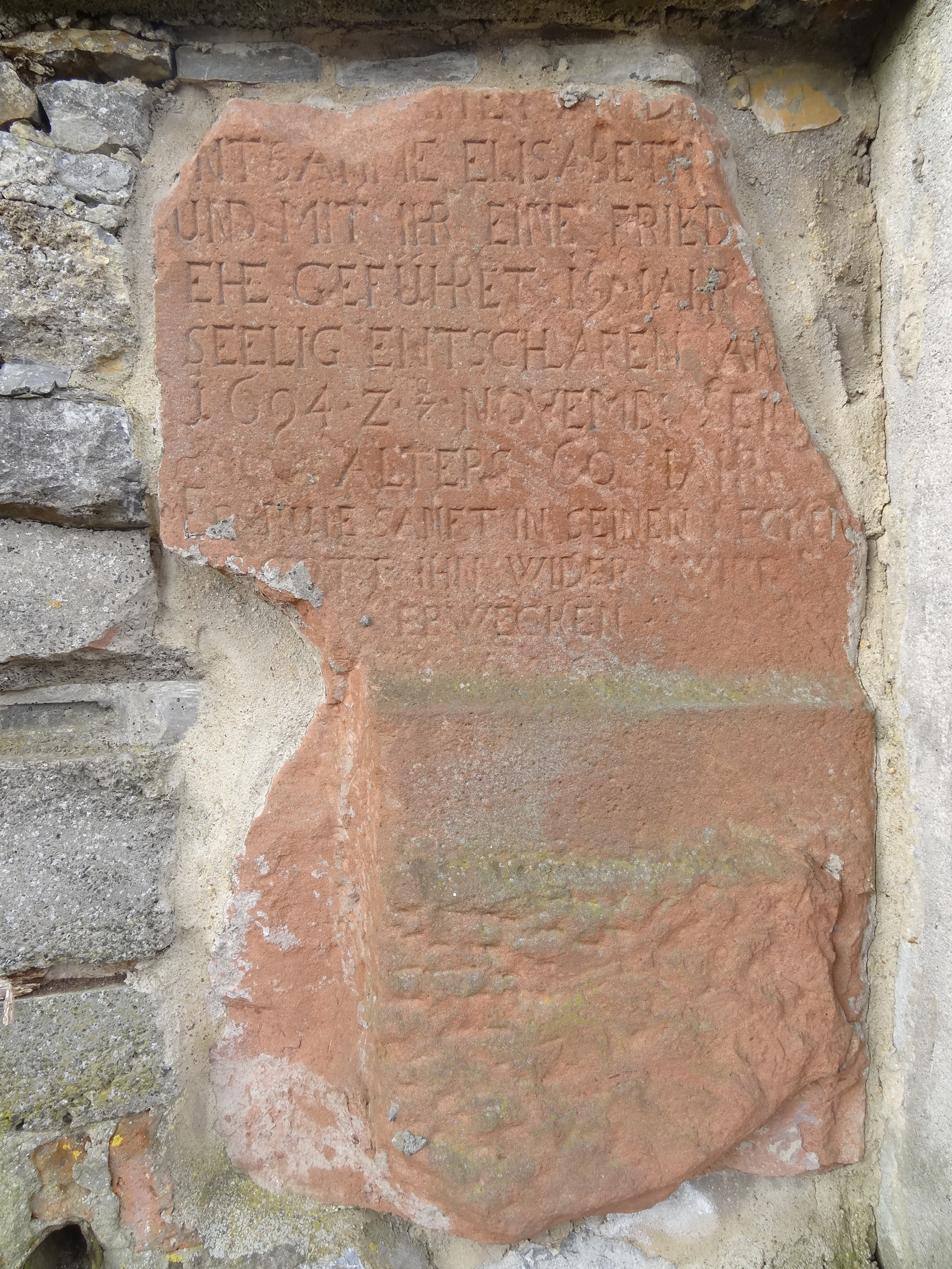 Alter Grabstein, Friedhofsmauer (Innenseite), Friedhofsweg ohne Nummer, 35428 Langgöns